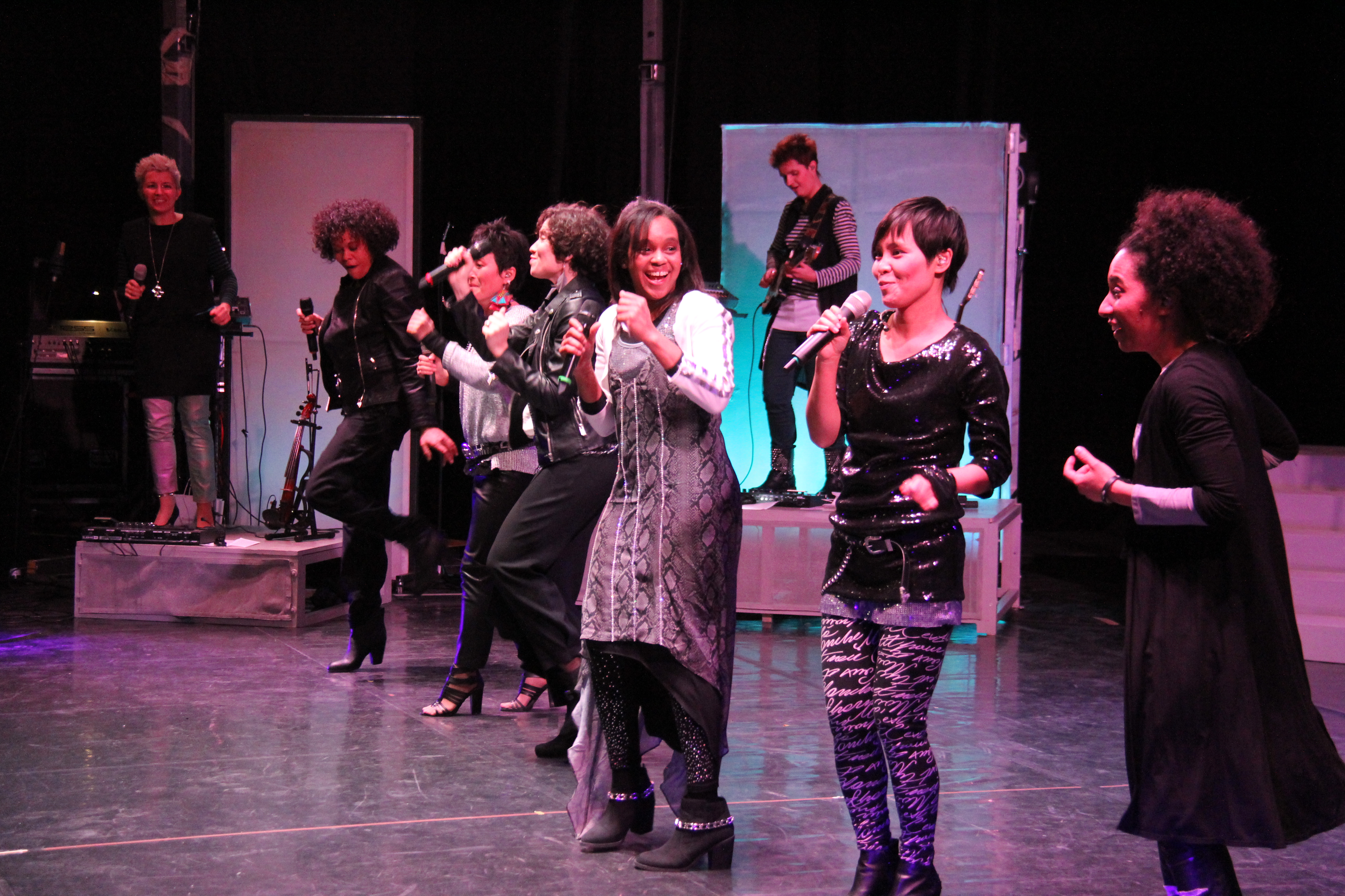 Gen Verde International Performing Arts Group